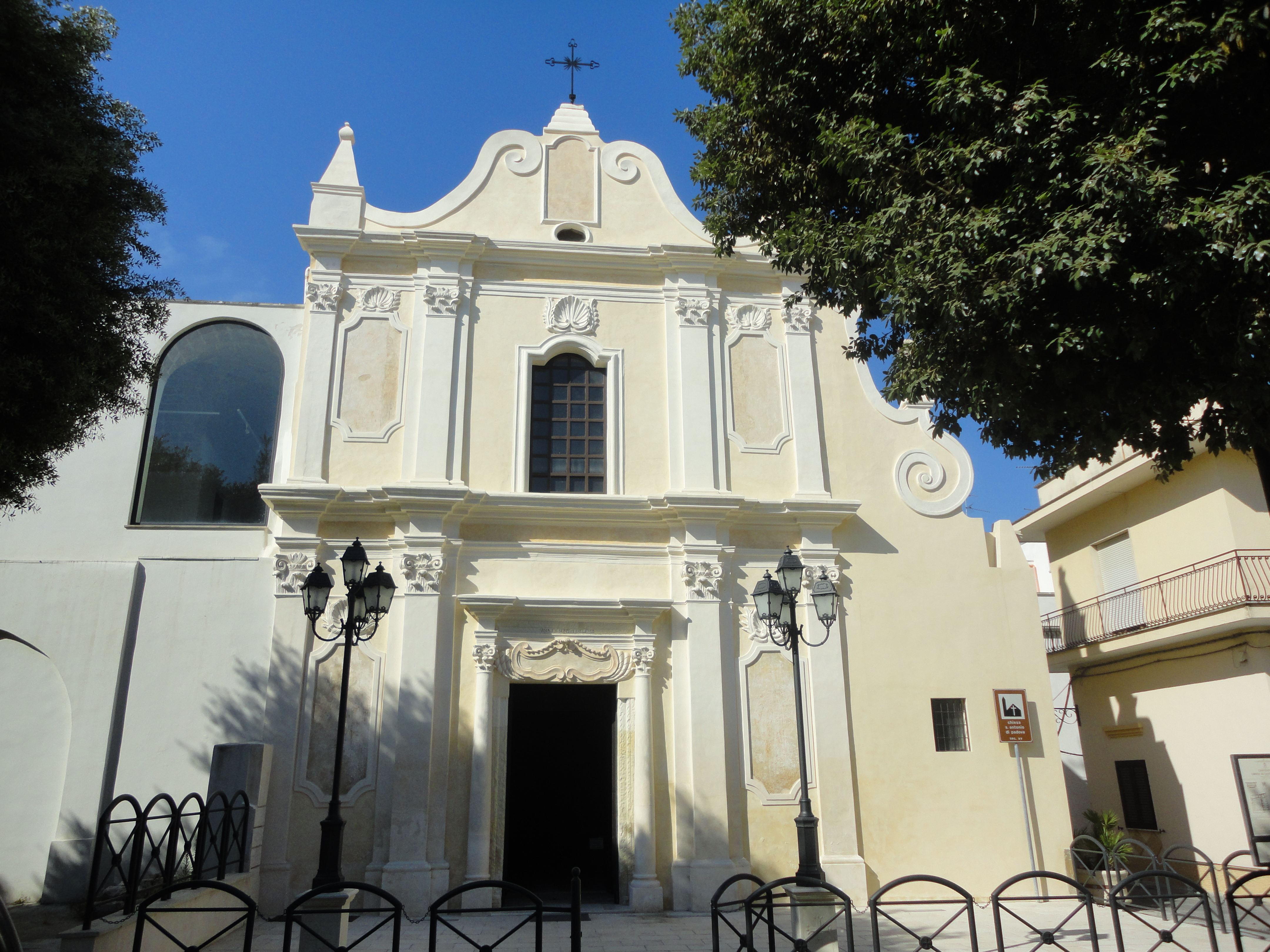 Chiesa di Sant'Antonio da Padova Nardò, Lecce